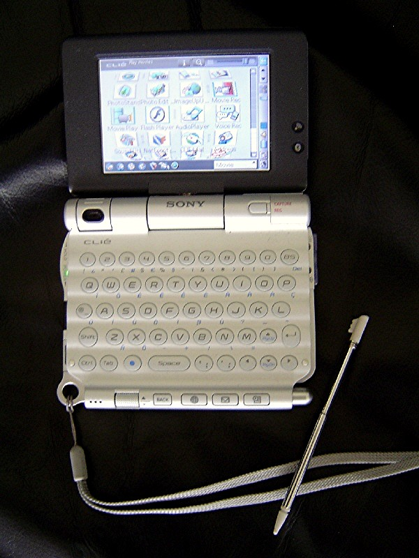 sonyux50-2 PDA von Sony mit eingebauter Kamera